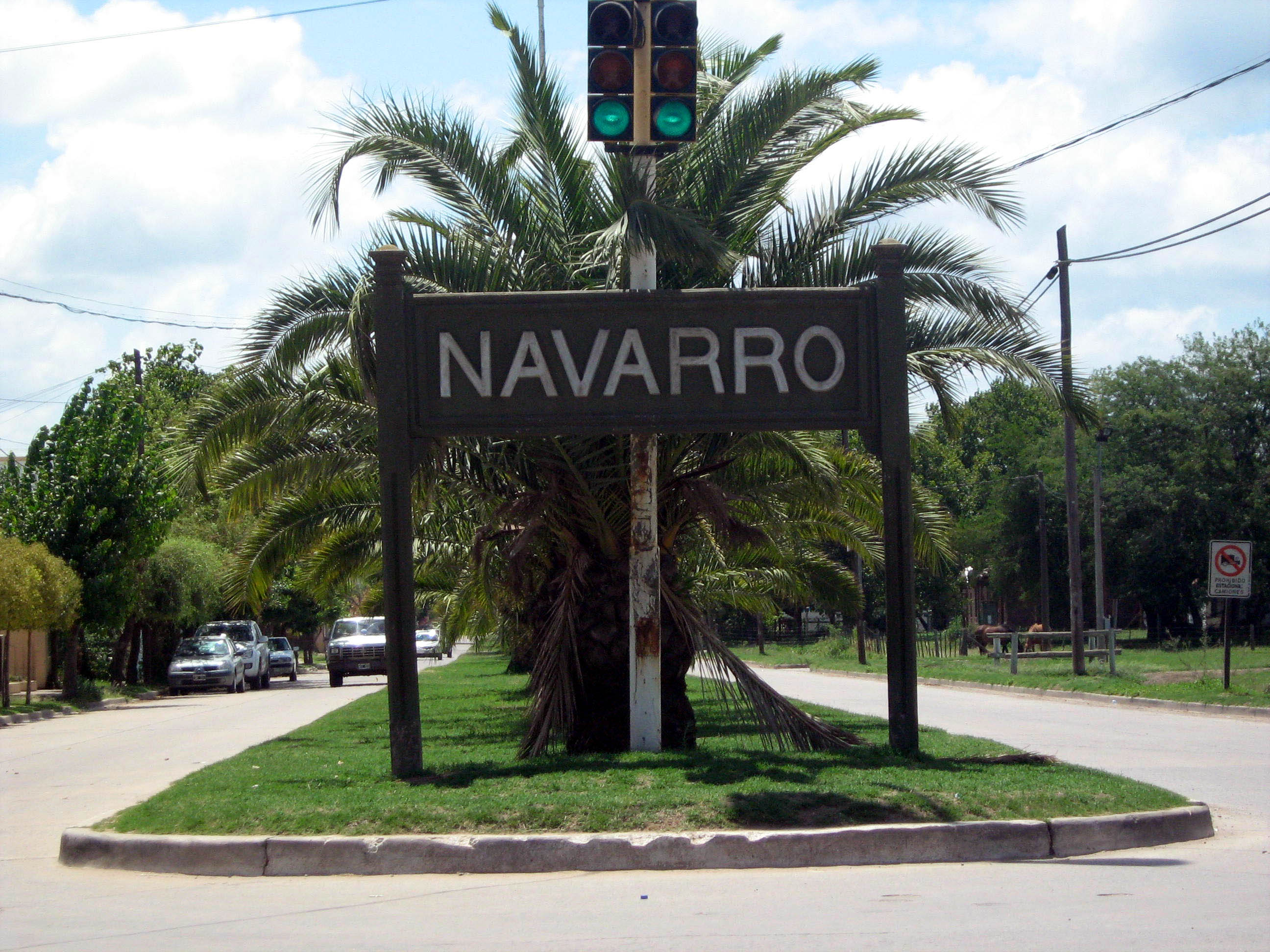 Entrada a ls ciudad de Navarro